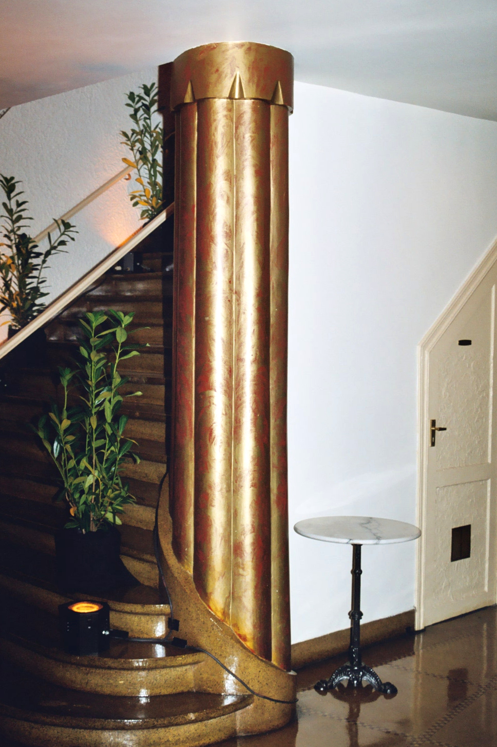 Belgique - Bruxelles - Roseland